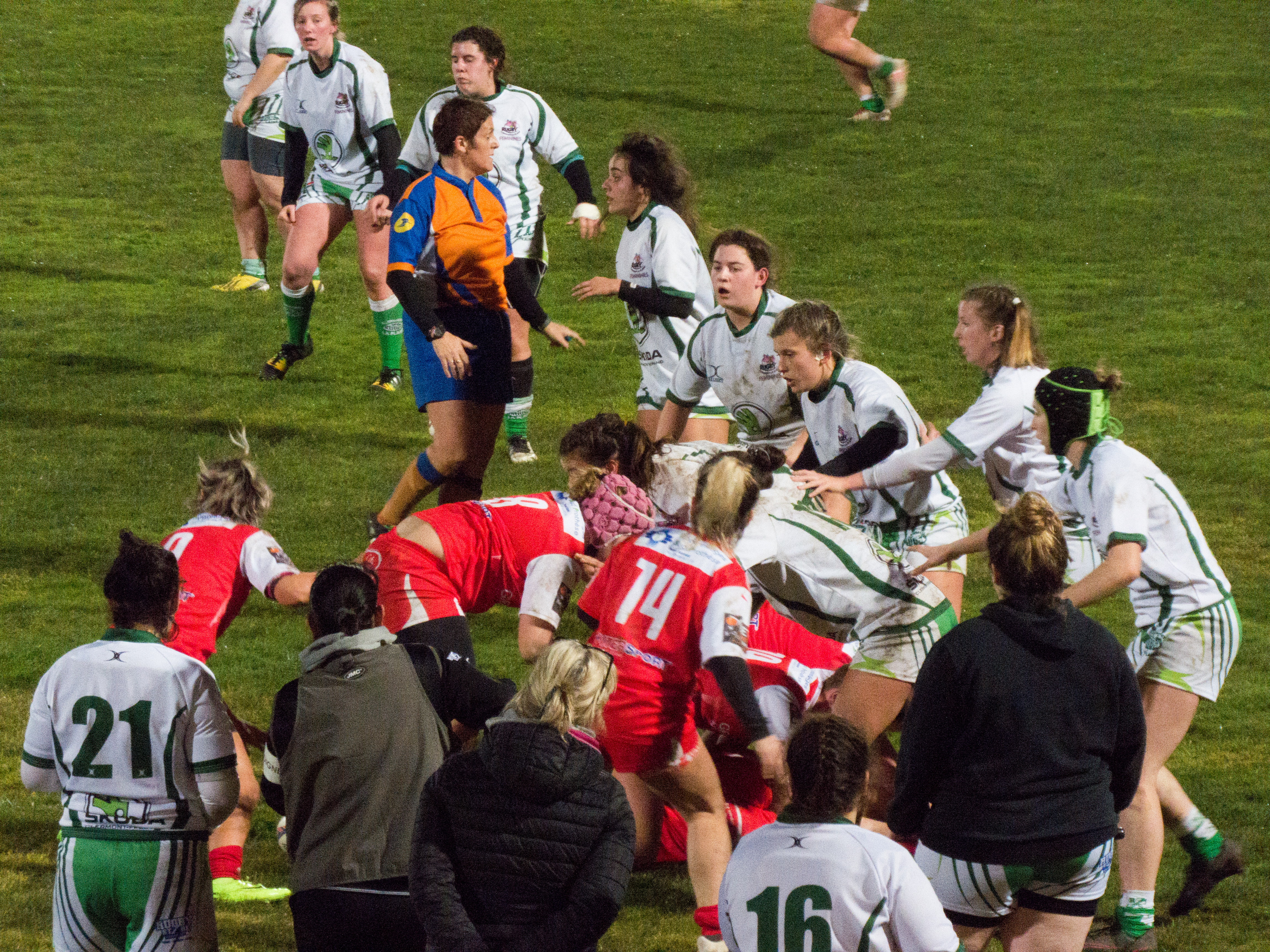 Fédérale 1 féminine 2018-2019 — 16 February 2019, stade Colette-Besson. Match between: US Dax — Q64027245